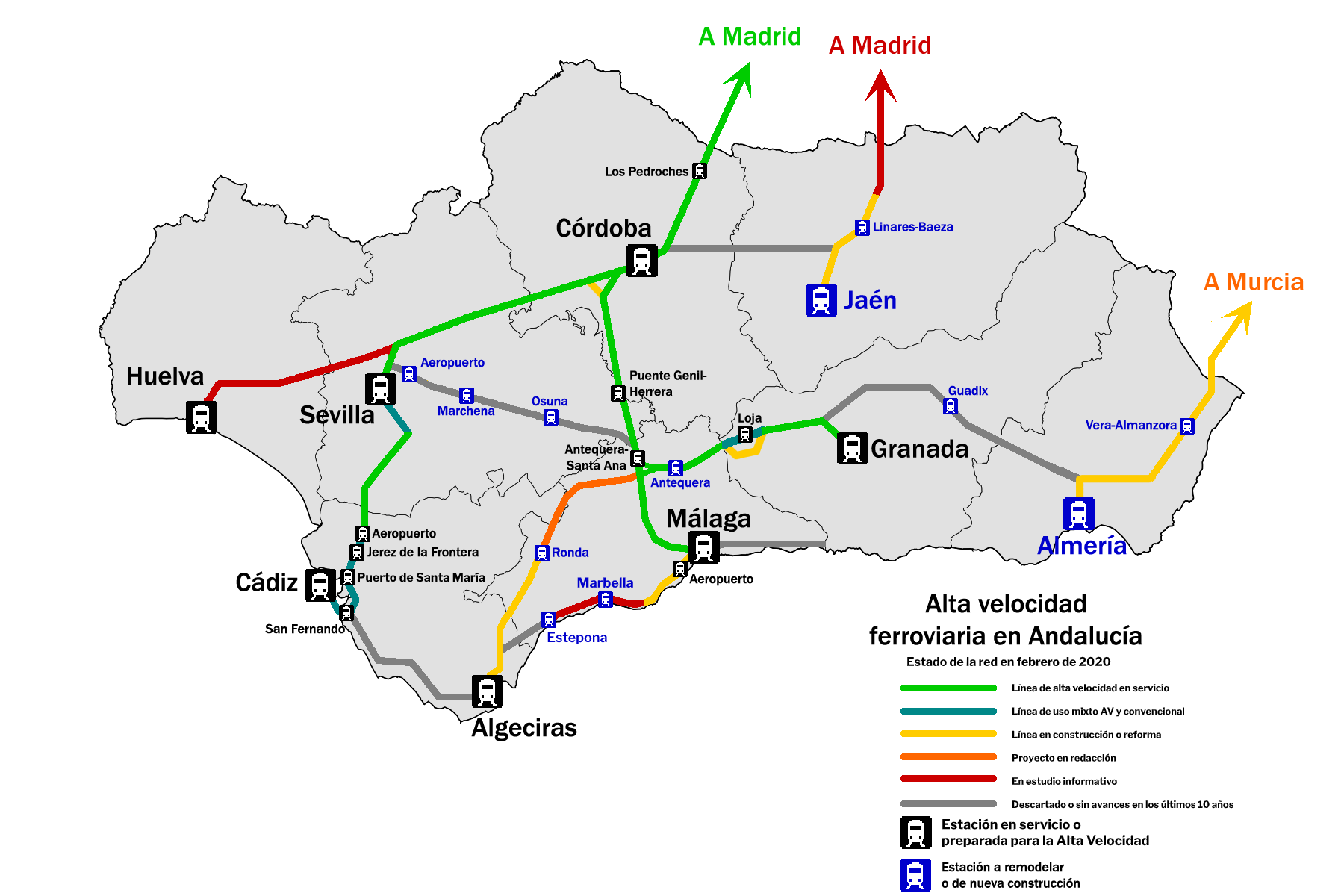 Líneas y estaciones de alta velocidad en servicio, ejecución y proyecto en Andalucía a fecha de abril de 2009.